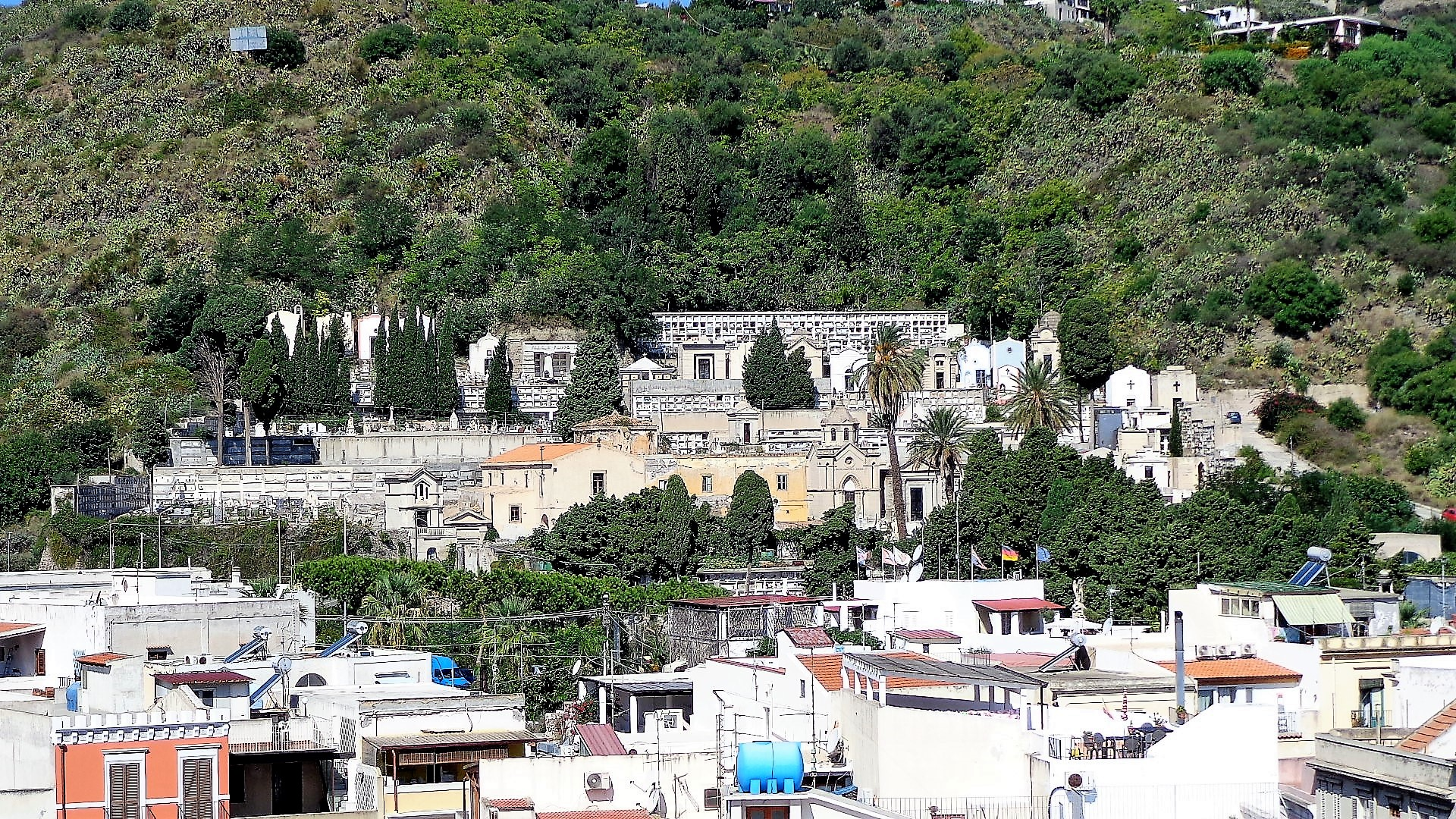 Chiesa dell'Assunta e cimitero di Lipari